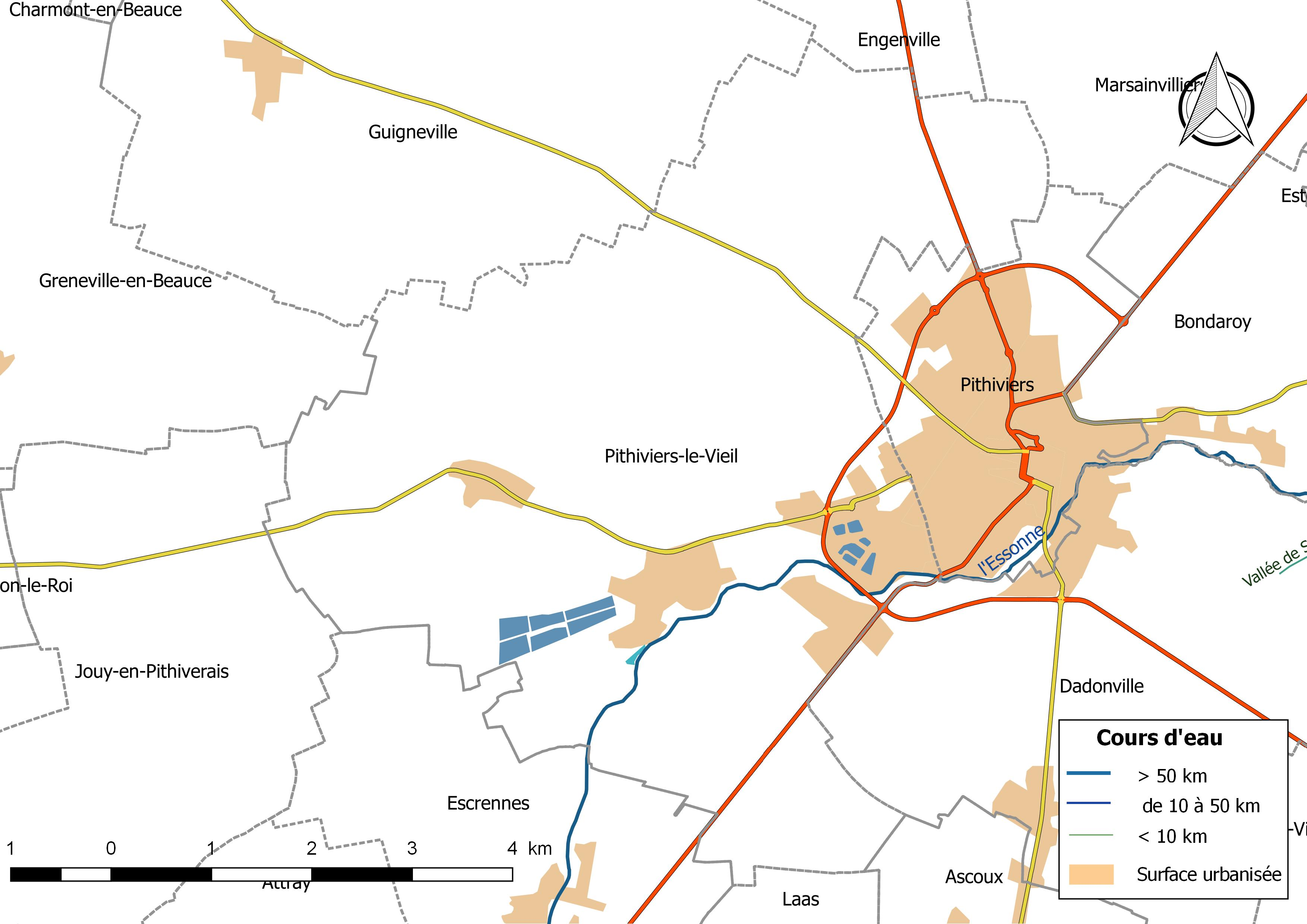 Carte du réseau hydrographique de la commune de Pithiviers-le-Vieil (France).